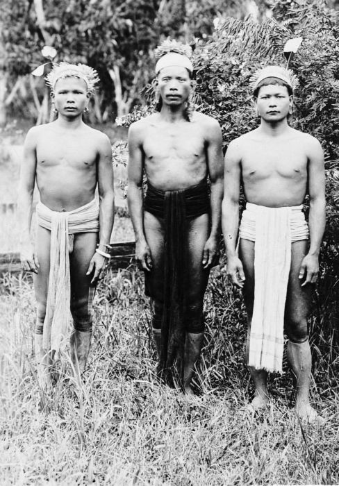 Repronegatief. Deze foto is gemaakt tijdens de Centraal-Nieuw-Guinea Expeditie van 1920-1922.. Drie Kenyah-Dajaks uit het gebied rond de Beneden Kajan-rivier in Borneo, die hebben deelgenomen aan de Centraal Nieuw-Guinea Expeditie van 1921-'22